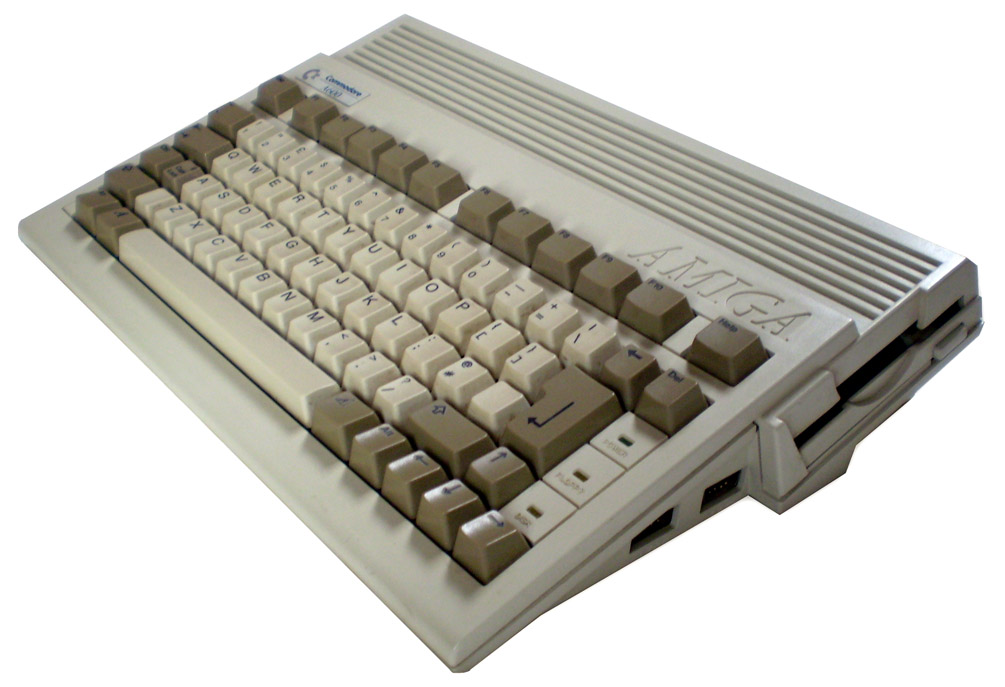 Amiga 600 (A600) home computer